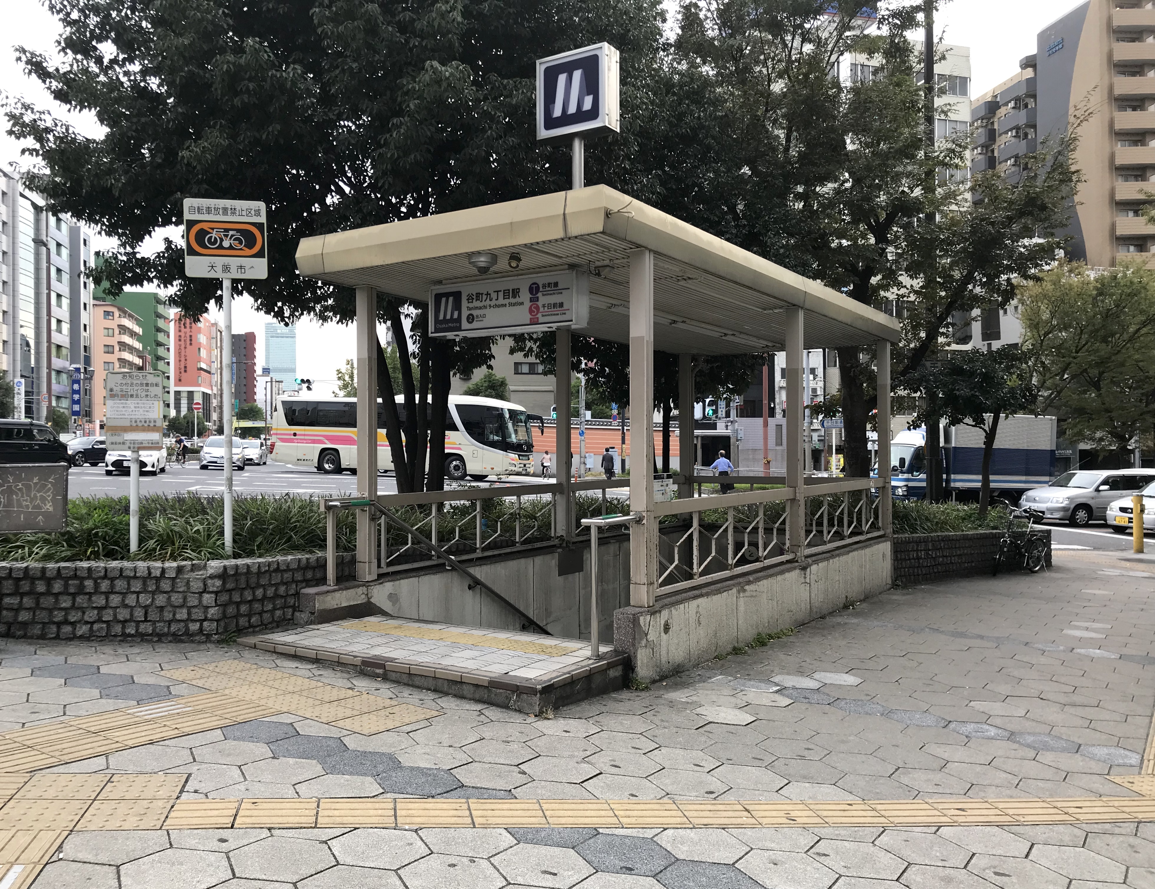 Osaka Metro谷町線・千日前線谷町9丁目駅2号出入口